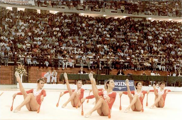 Conjunto español júnior en el Campeonato Europeo Júnior de Gimnasia Rítmica de Atenas en 1987. El equipo estaba integrado por Alejandra Bolaños, Eva Martín, Carmen Martínez, Arancha Marty, Carmen Moreno, Raquel Prat, Nuria Rico y Carmen Sánchez.